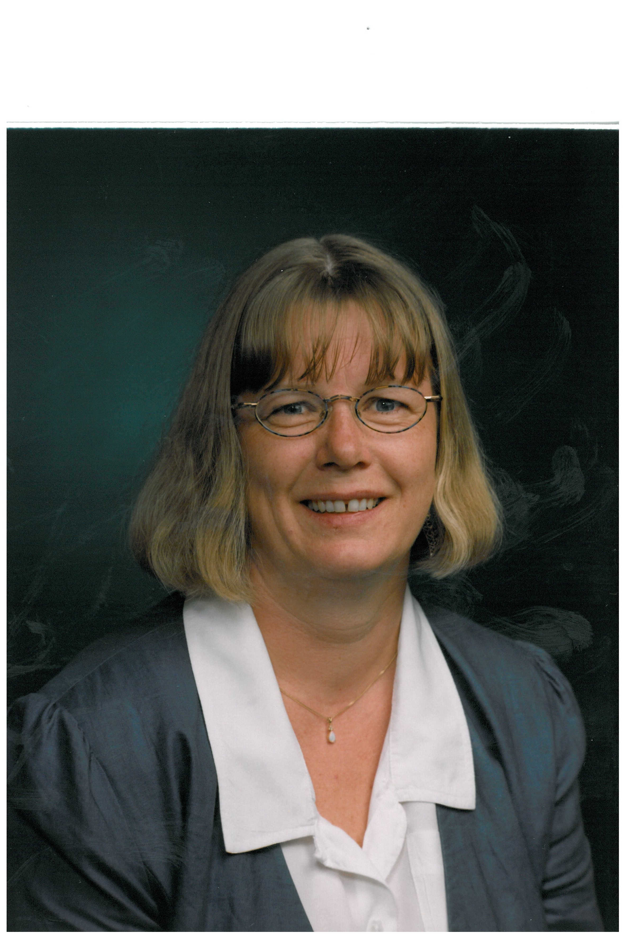 2. kandidat fylkestingslista Akershus Venstre. Foto: (C) Jan Bryde-Erichsen